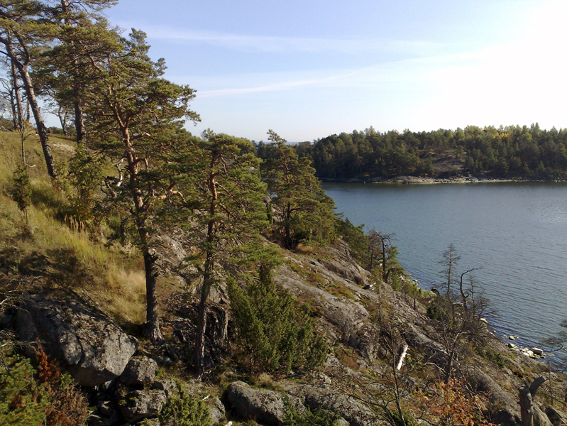 näkymä Santahaminan lounaisrannalta etelään.